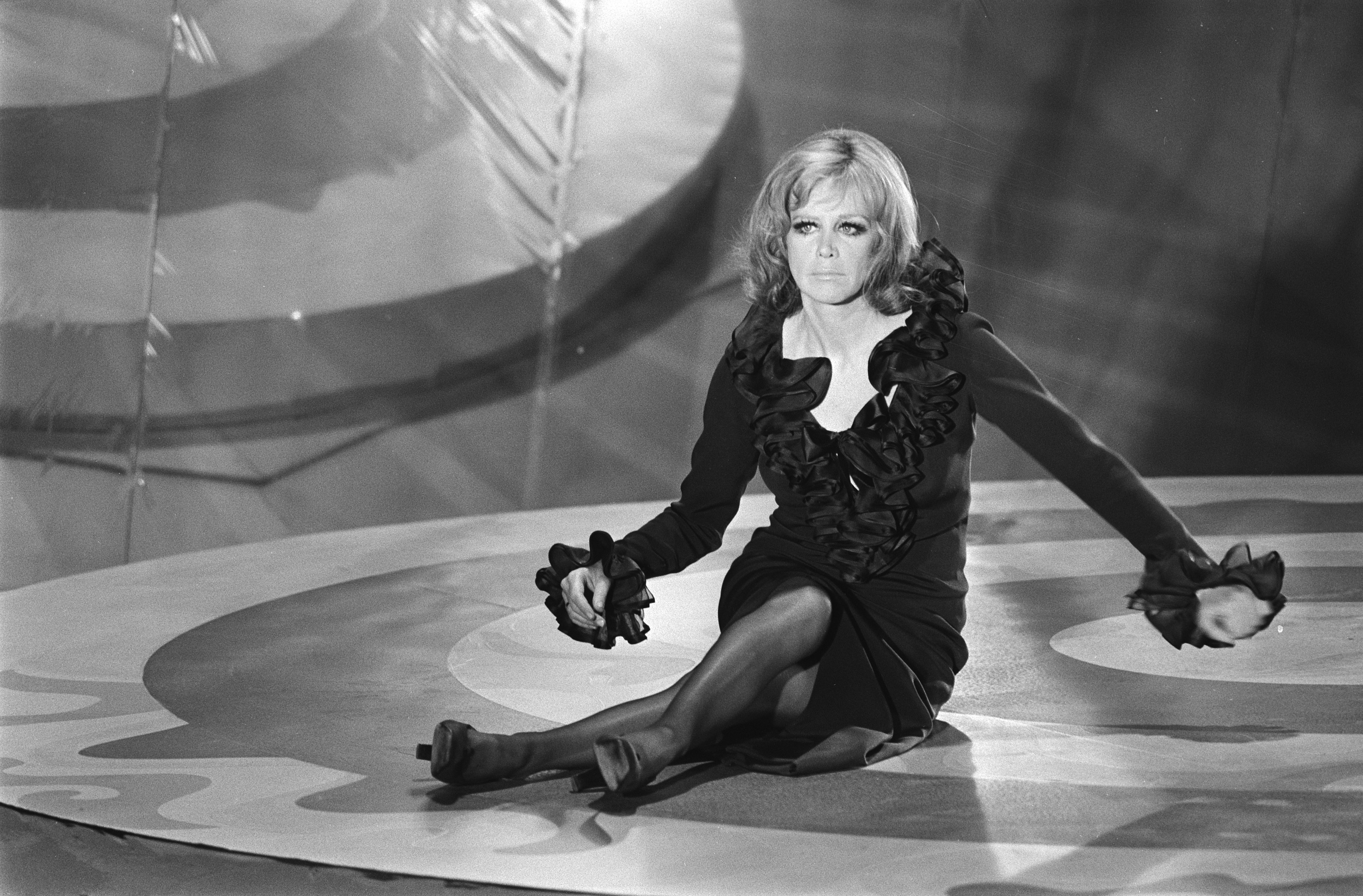 Collectie / Archief : Fotocollectie Anefo Reportage / Serie : [ onbekend ] Beschrijving : TV-show rond Hildegard Knef van KRO; H. Knef tijdens opnamen Datum : 2 november 1970 Trefwoorden : TV-shows Persoonsnaam : Knef, Hildegard Fotograaf : Mieremet, Rob / Anefo Auteursrechthebbende : Nationaal Archief Materiaalsoort : Negatief (zwart/wit) Nummer archiefinventaris : bekijk toegang 2.24.01.05 Bestanddeelnummer : 923-9776